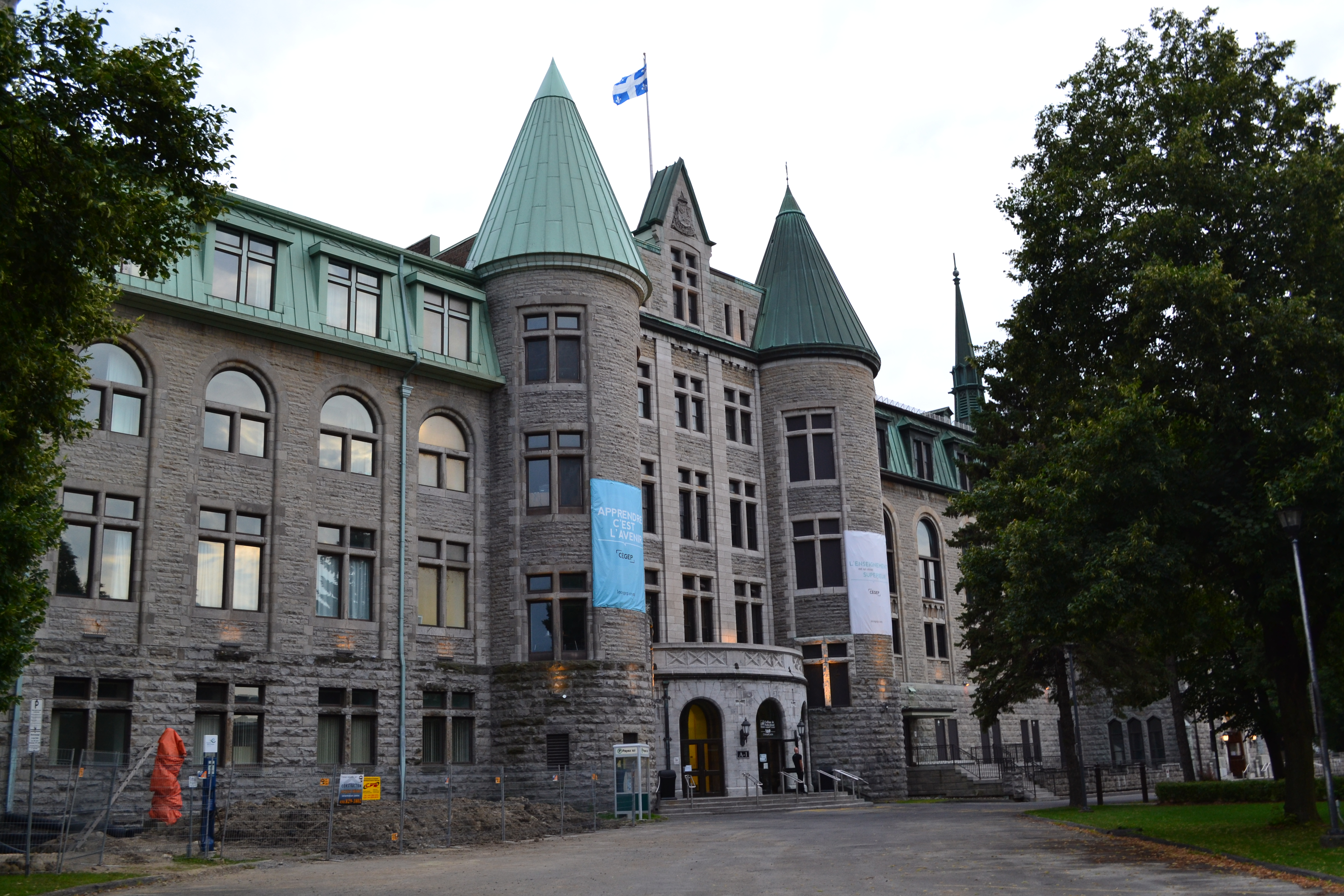 Une entrée à l'avant du collège de Valleyfield à Salaberry-de-Valleyfield, Québec